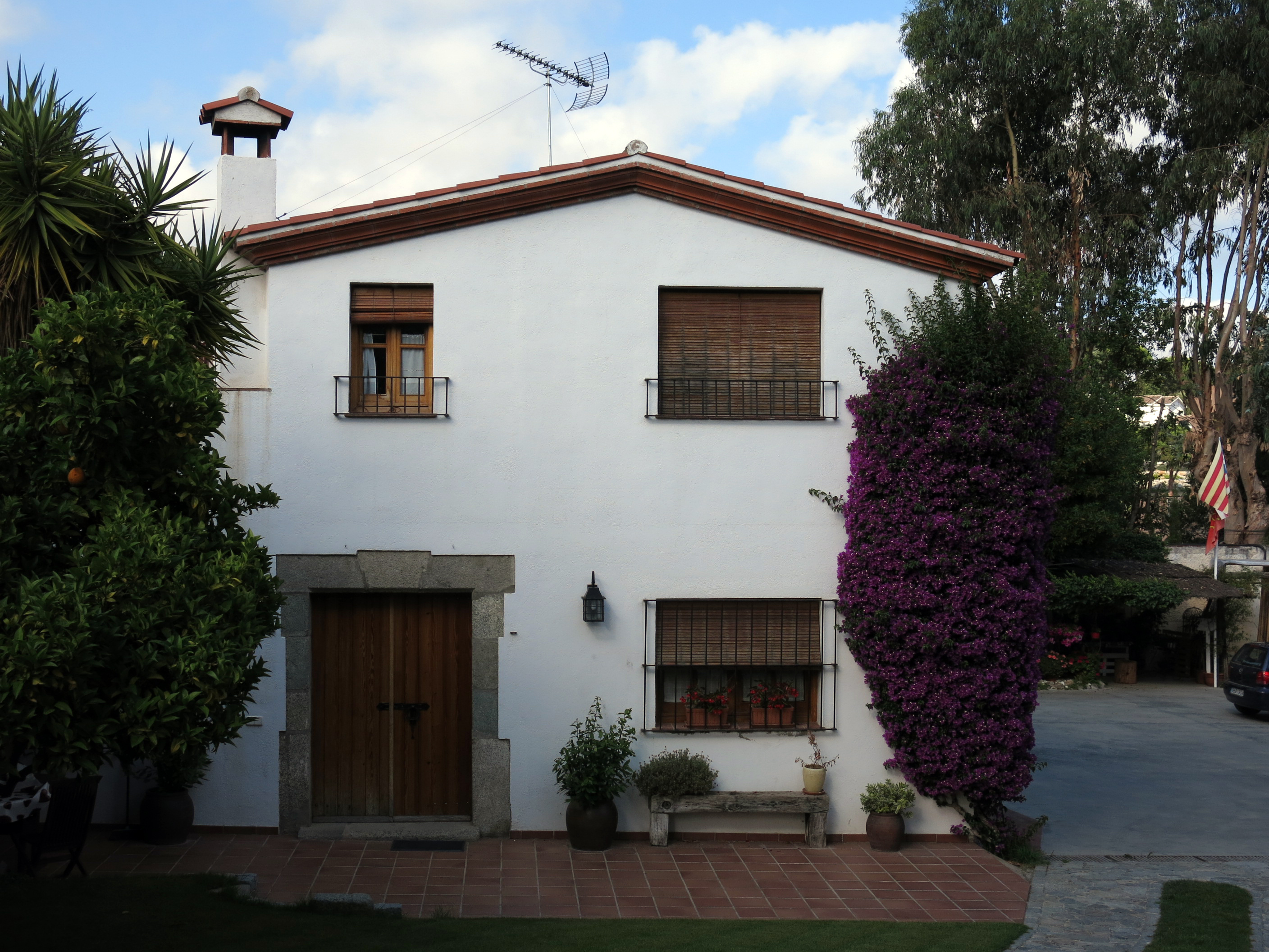 Masoveria de Can Martí-Martí (Sant Andreu de Llavaneres)